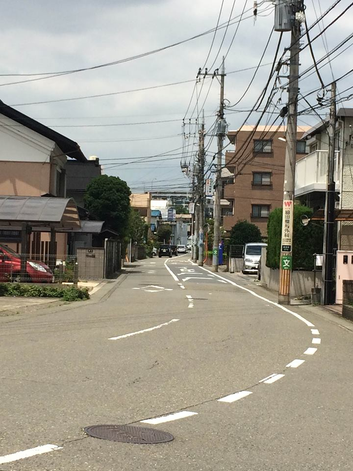 大山道の�荏田宿を下宿人道橋から臨む